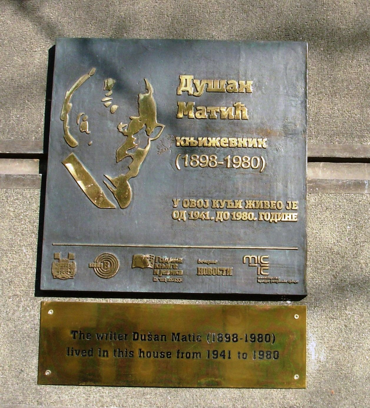 Spomen Dušanu Matiću, pesniku na zgradi u ulici Vojvode Dobrnjca, u Beogradu, zgradi u kojoj je živeo preko 40 godina. Slikao Goldfinger